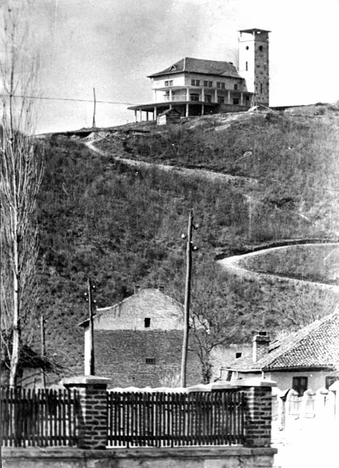 Сградата на Ловния дом в гр. Фердинанд (Монтана), построен през 30-те години на ХХ век